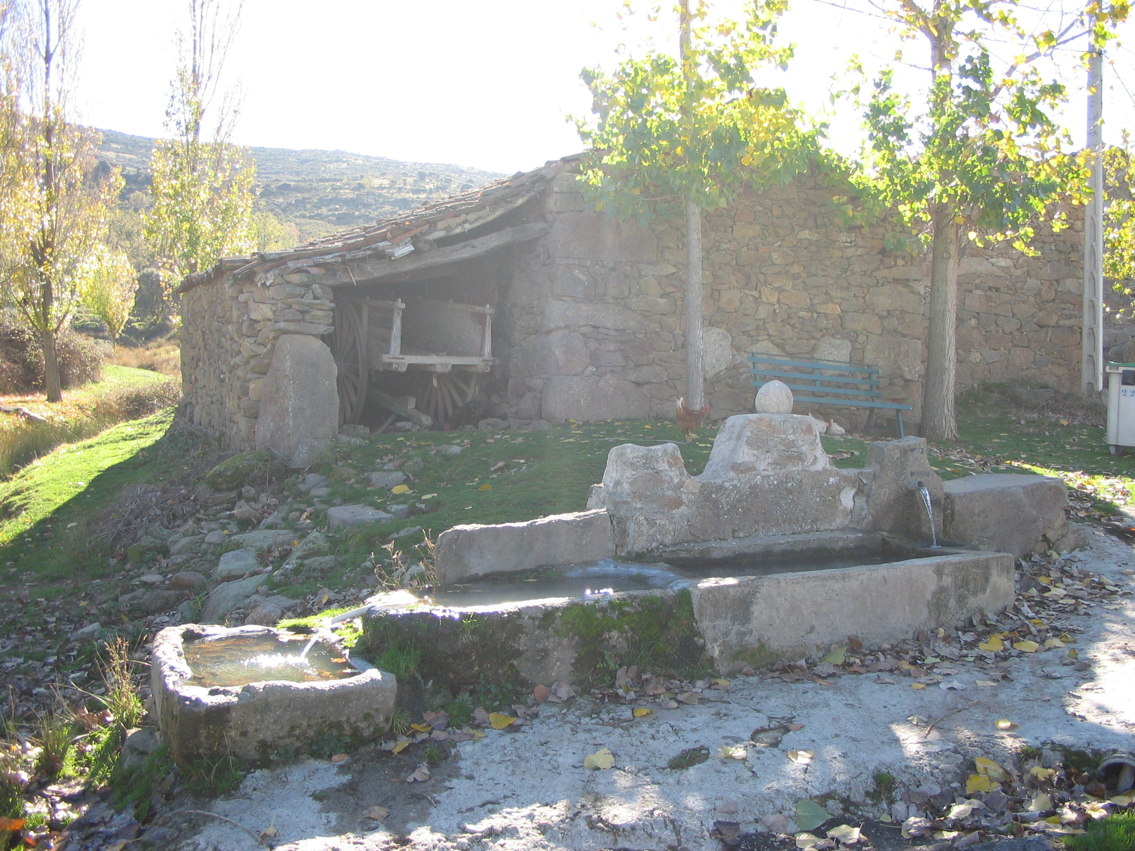 Vista del abrevadero de la majada de Las Navas en el Municipio de La Aldehuela (Ávila), España / Sight of Las Navas, at La Aldehuela village, in Ávila (Spain).